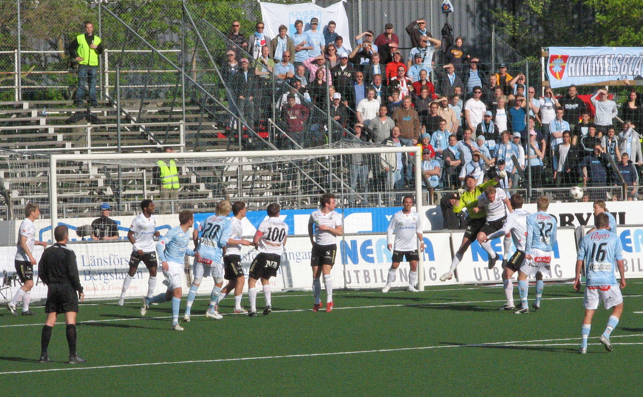 The Fotbollsallsvenskan game Örebro SK-Malmö FF (0-3) at Behrn Arena in Örebro, Sweden.